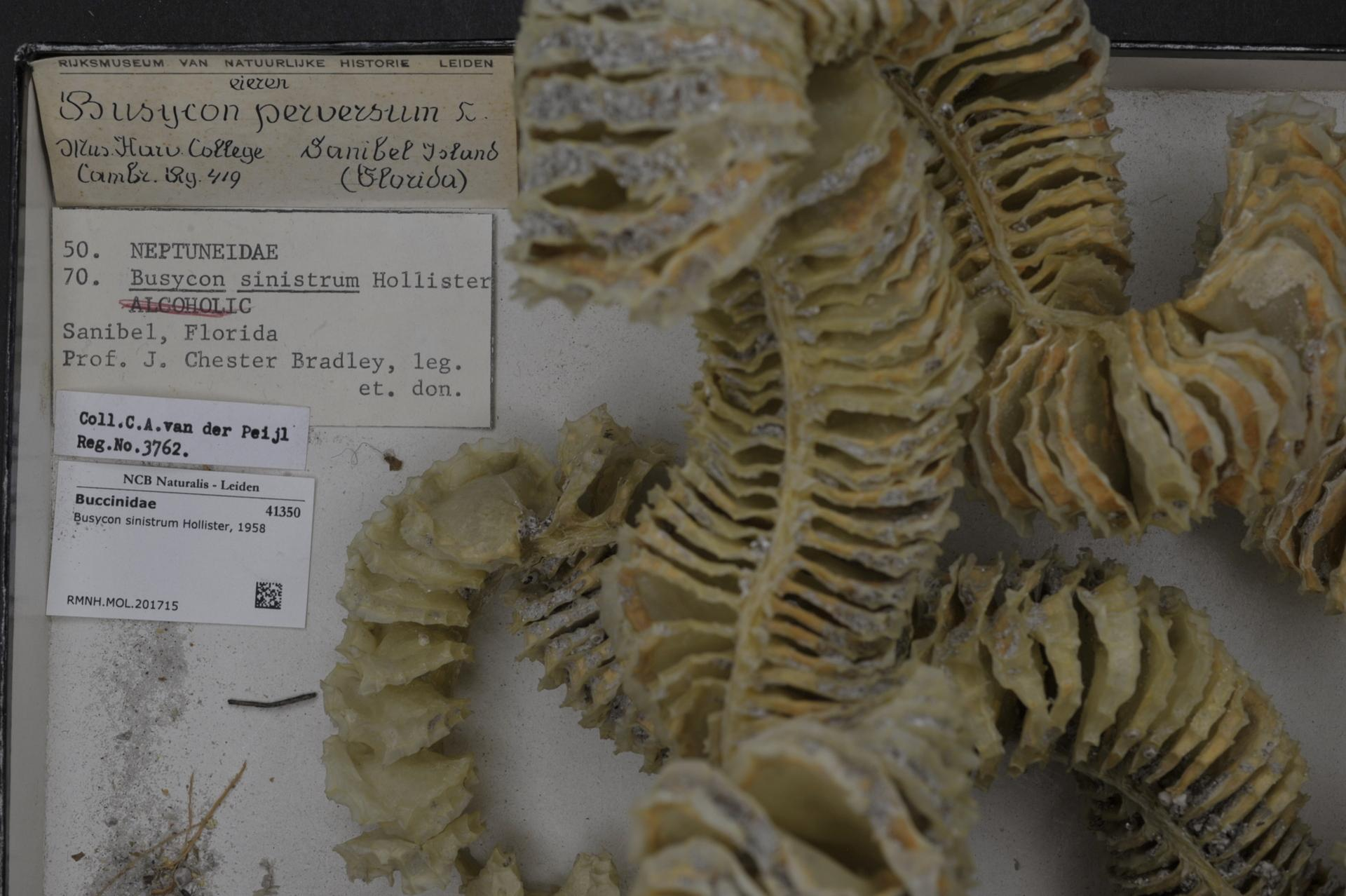 Busycon sinistrum Hollister, 1958